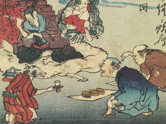 Sado-no-kuni Dōsan-tanuki (佐渡国同三狸) from Kyōsai-Hyakuzu (狂斎百図)